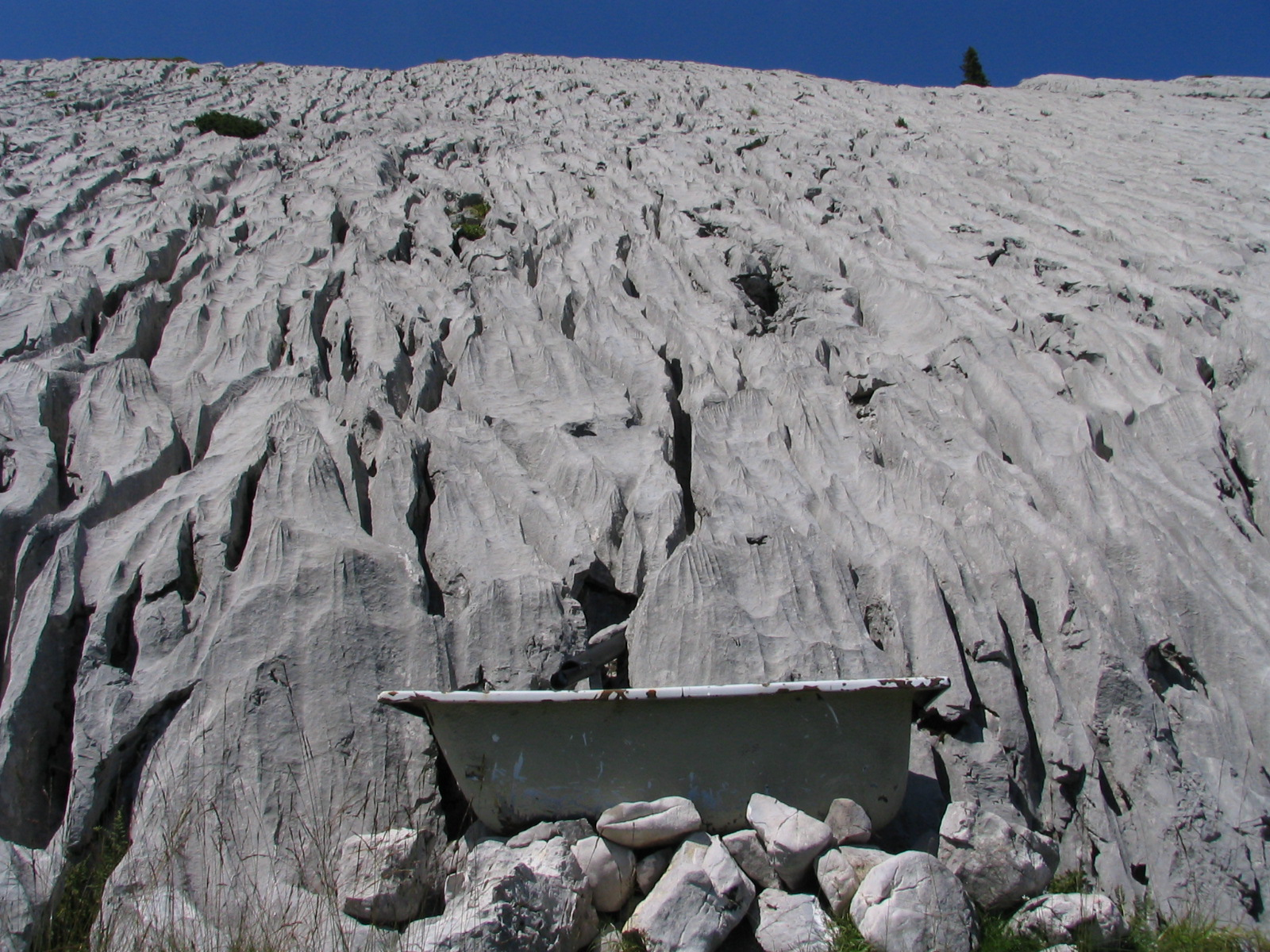 Schrattenkalk in der Schrattenfluh, Kanton Luzern, Schweiz/Switzerland. Die alte Badewanne dient dem Vieh als Wasserreserve.